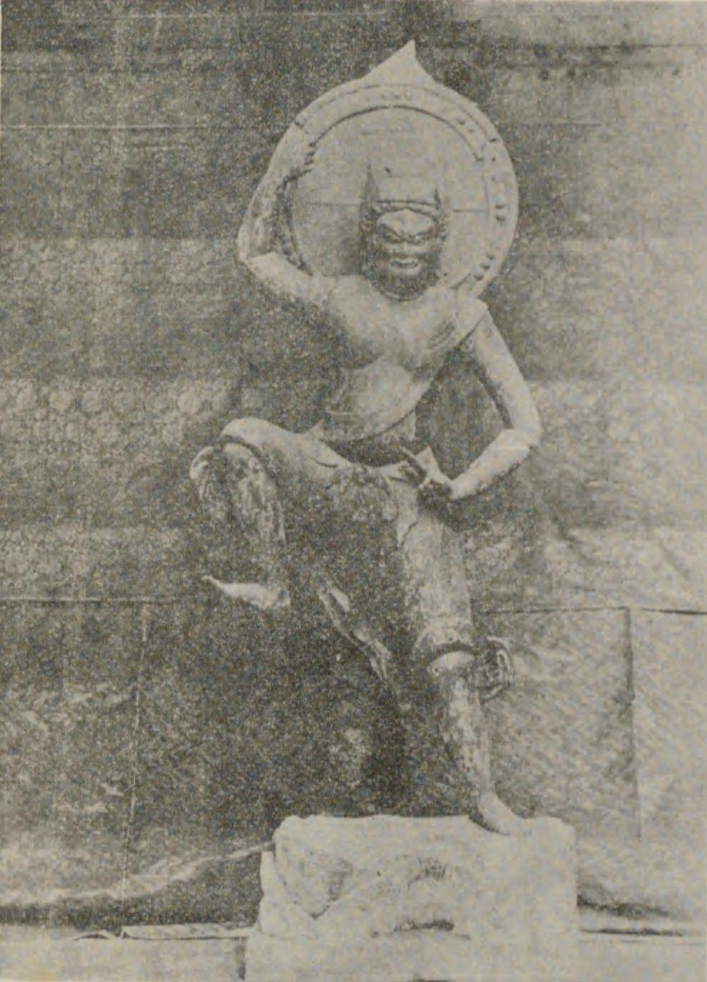 鳥取県東伯郡三朝町・三仏寺所蔵の木造蔵王権現立像（重要文化財）。1168年（仁安3年）の作。もと奥院（投入堂）安置。